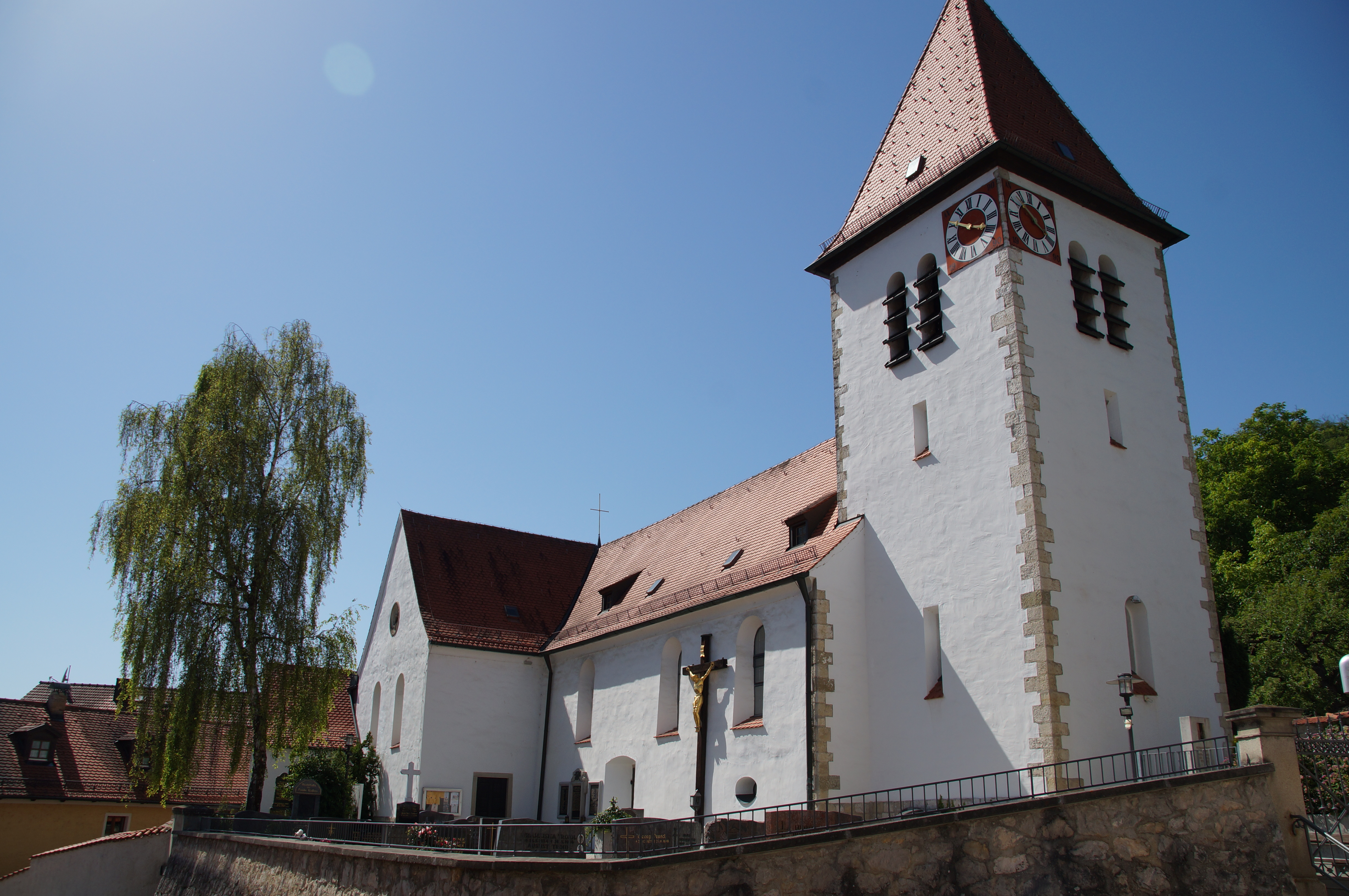 Katholische Pfarrkirche St. Nikolaus, ehemalige Chorturmkirche, Saalbau mit Ostturm, westlichem Querhaus und eingezogenem Chor, Langhaus im Kern 13. Jahrhundert, 1905 Umorientierung nach Westen mit Chor und Querhaus, 1937 Neubau des baufälligen Turmes durch Heinrich Hauberrisser; mit Ausstattung; This is a photograph of an architectural monument.